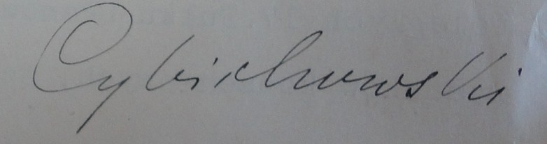 Podpis Stefana Cybichowskiego, z jego listu